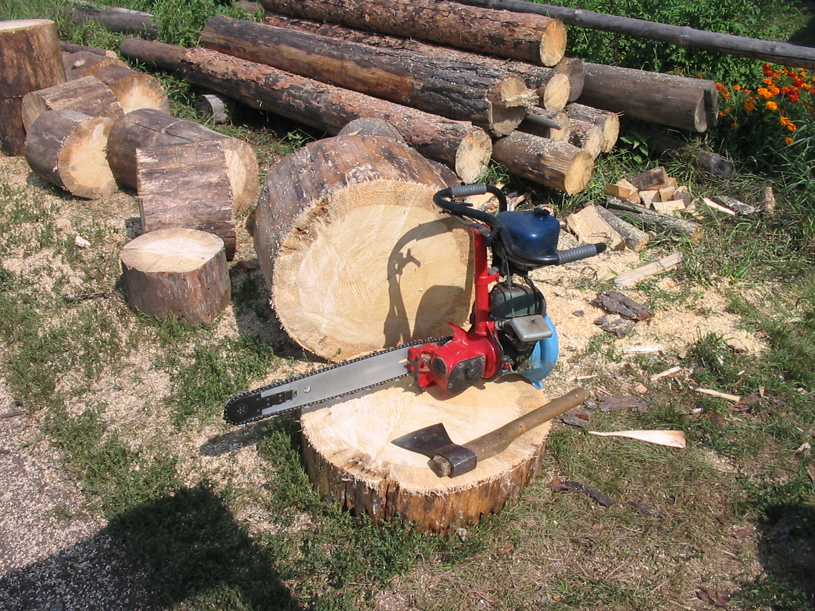 Бензиномоторная пила "Дружба"